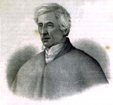 Imagen del escritor colombiano Eugenio Díaz Castro en el periódico El Mosaico, trimestre I, núm. I, Bogotá, 24 de diciembre de 1858, página 17.